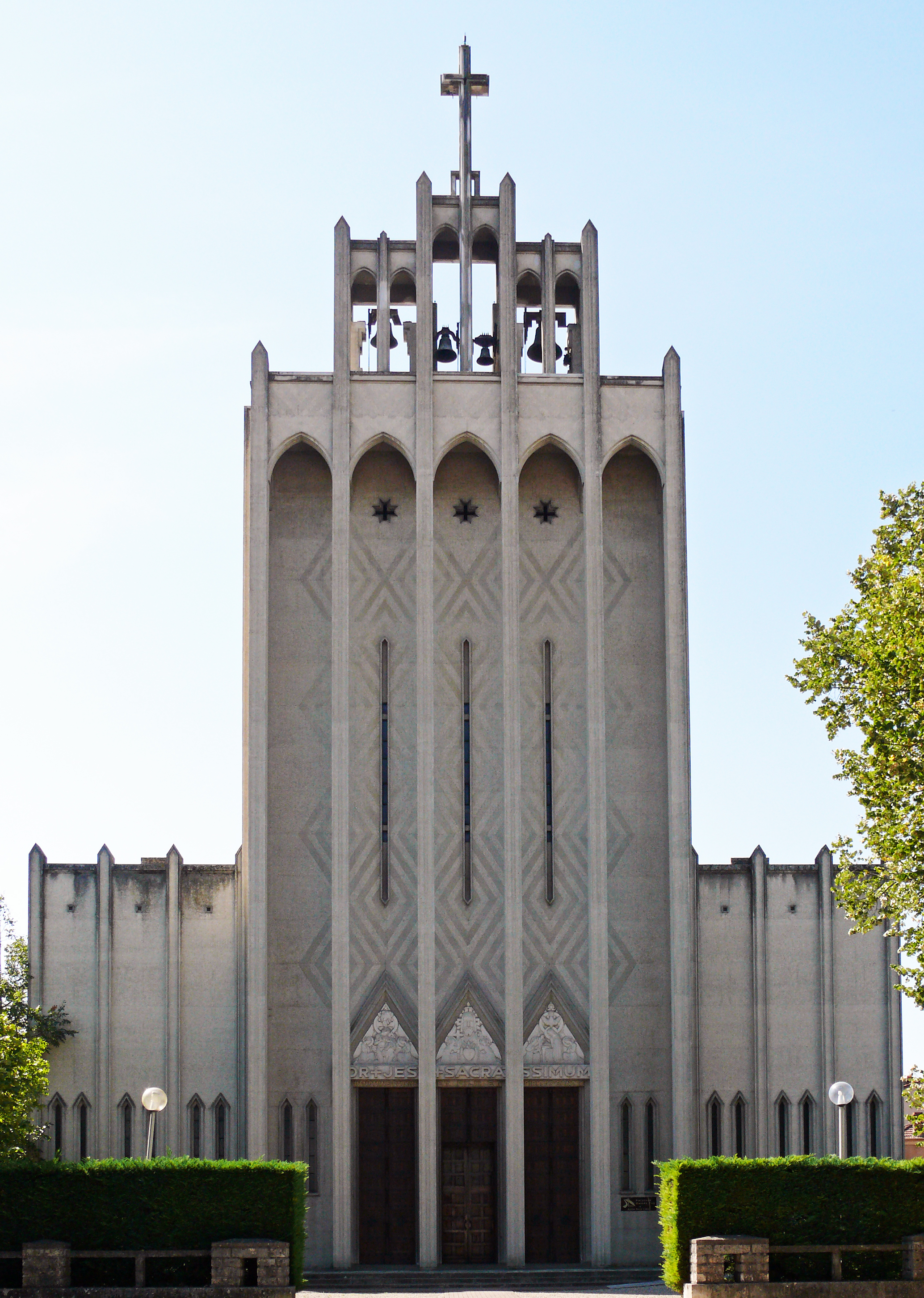 Agen - Église du Sacré-Cœur - Clocher-porche réalisé par Henri Vidal en 1947